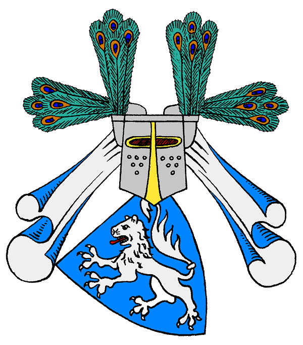 Stammwappen derer von Westernhagen